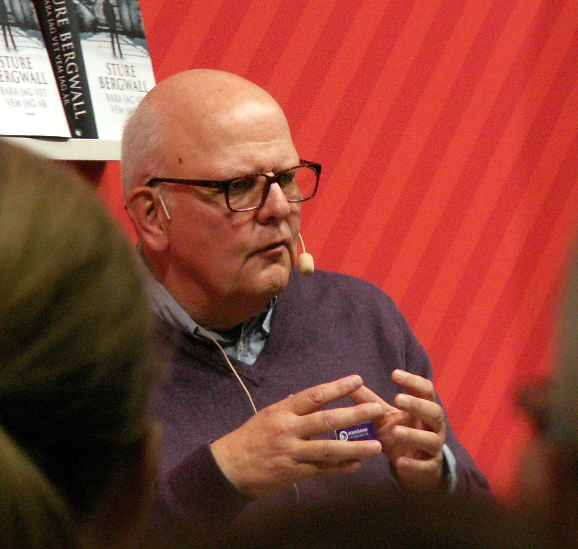 Sture Bergwall på Bokmässan i Göteborg 2016.